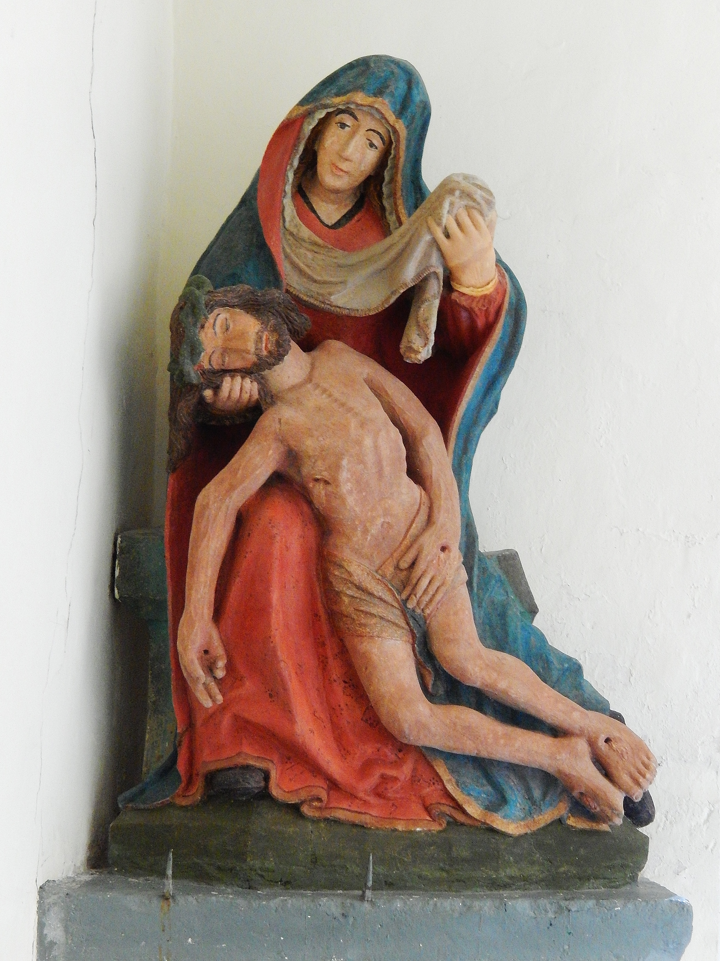 Pietà dans l'entrée de l'église d'Attignéville (Vosges). Pierre peinte. Fin 15e siècle/début 16e siècle (?). Classée MH